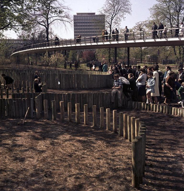 Bundesgartenschau 1967 Karlsruhe